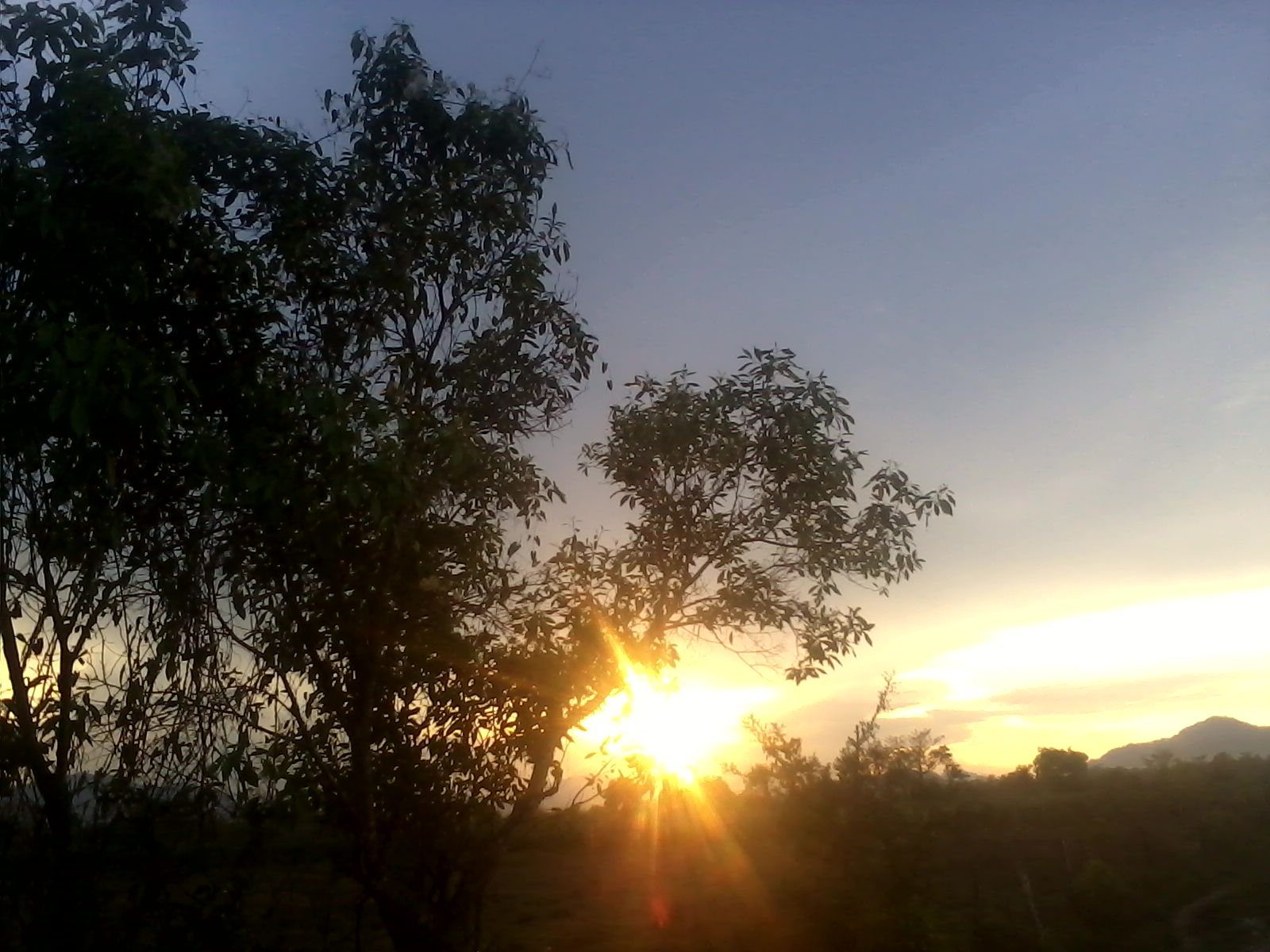 Un Atardecer Sobre Los cerros De La Colonia Benito Juarez, Mpio. Concordia,Chiapas, México. Su extensión territorial es de 1,112.90 km² que representa el 13.38% de la superficie de la región frailesca y el 1.47% de la superficie estatal. El clima es cálido subhúmedo con lluvias en verano y semicálido húmedo,con una precipitación pluvial de 1,450 milimetros anuales. Chiapas posee una gran variedad de recursos naturales, desafortunadamente su explotación irracional ha devastado extensas áreas de bosques y Selvas, provocando la pérdida de especies de flora y fauna silvestre. Dentro de su territorio se encuentra el Área Natural y Típica La Concordia Zaragoza, y también abarca parte de la Zona de Protección Forestal la Frailescana y de la Reserva de la Biósfera El Triunfo